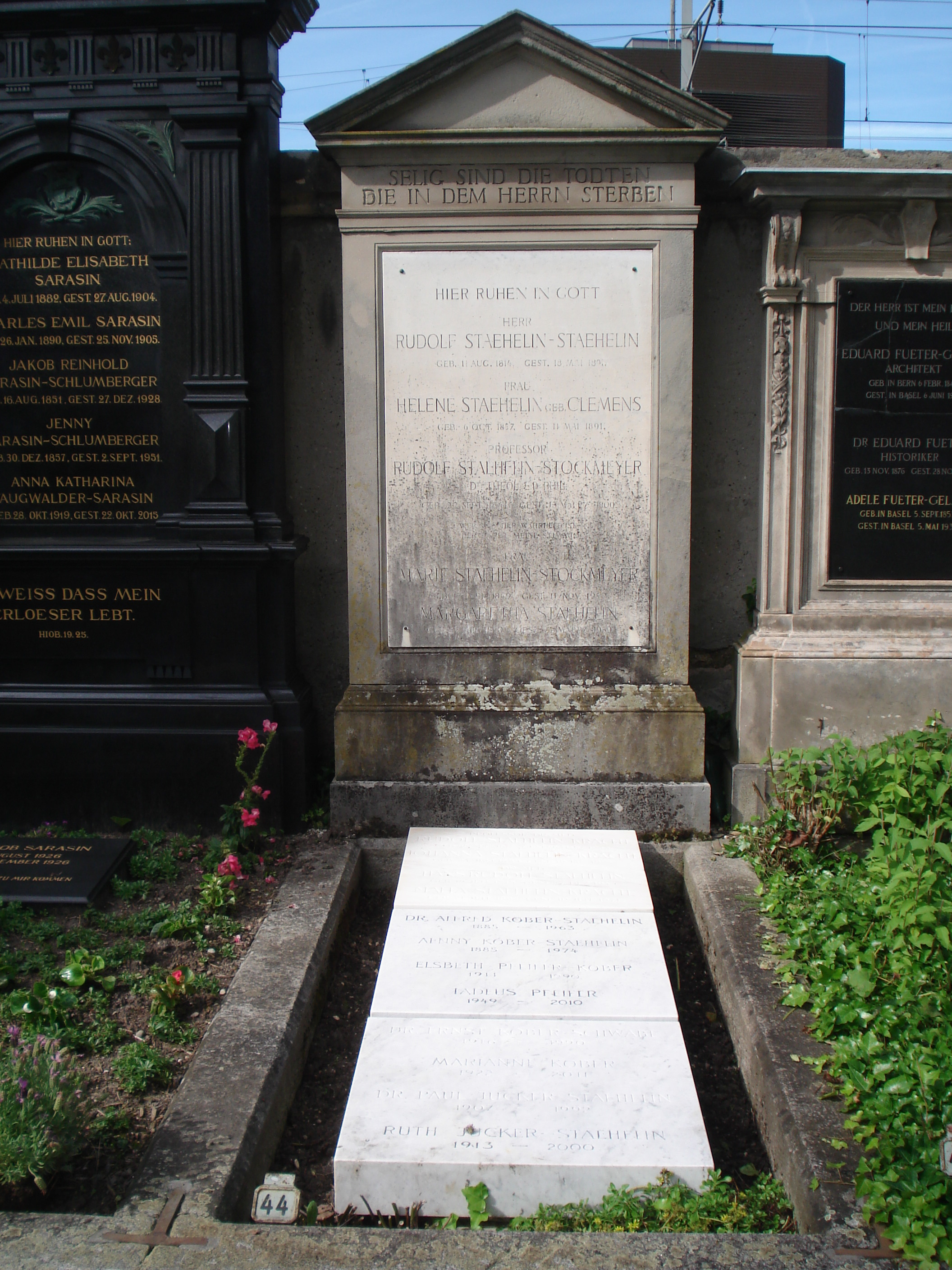 Familiengrab Staehelin im, Abteilung 6, Grab-Nummer 44.